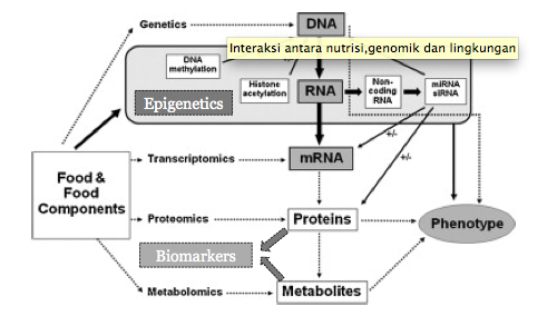 Interaksi antara nutrisi,genomik dan lingkungan